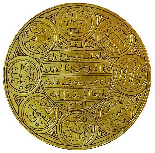 Segel resmi Sultan Aceh, Sekarang Digunakan Oleh Wali Nanggroe Aceh